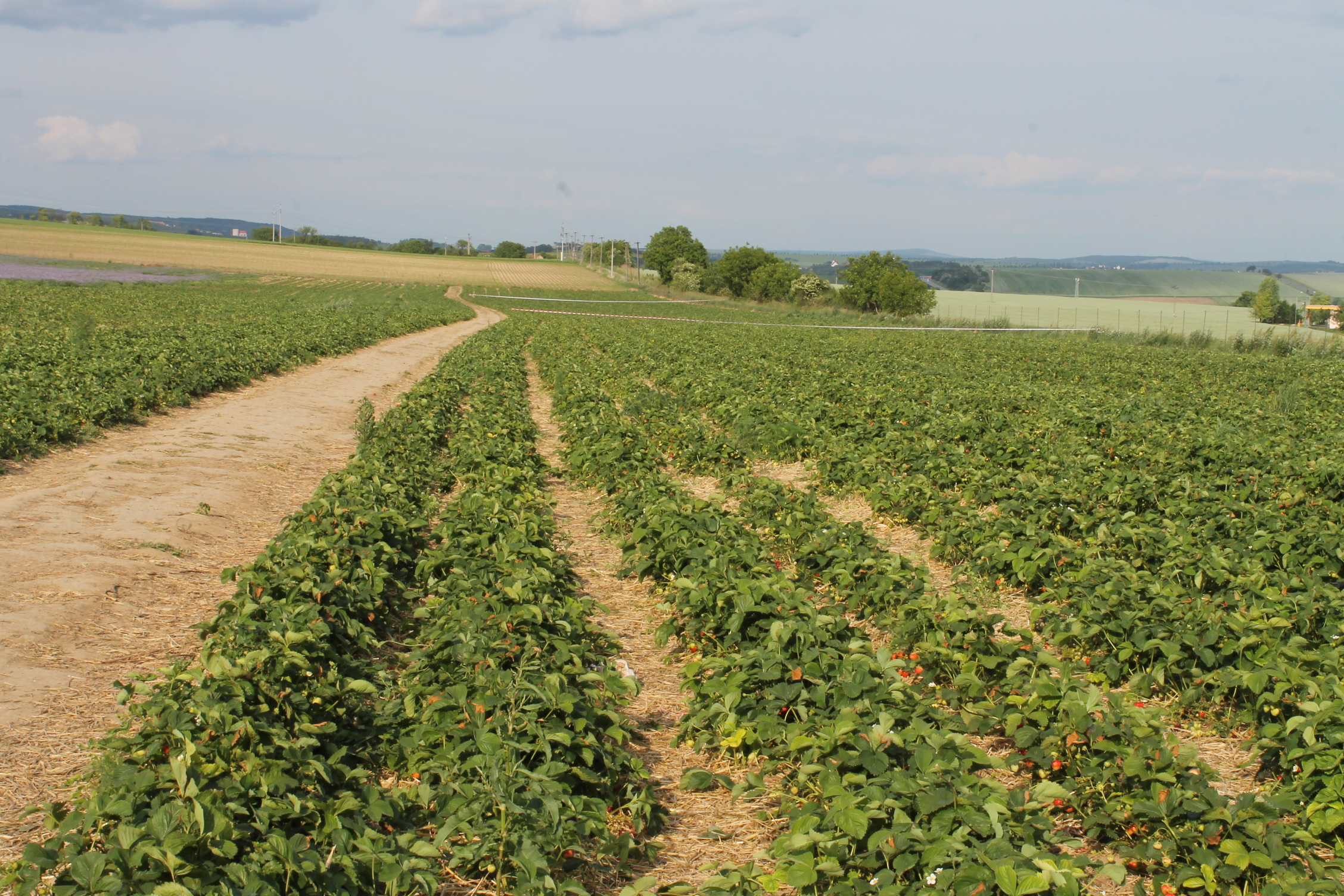 2014 06 01, jahodárna Brno - Slatina, Czech republic